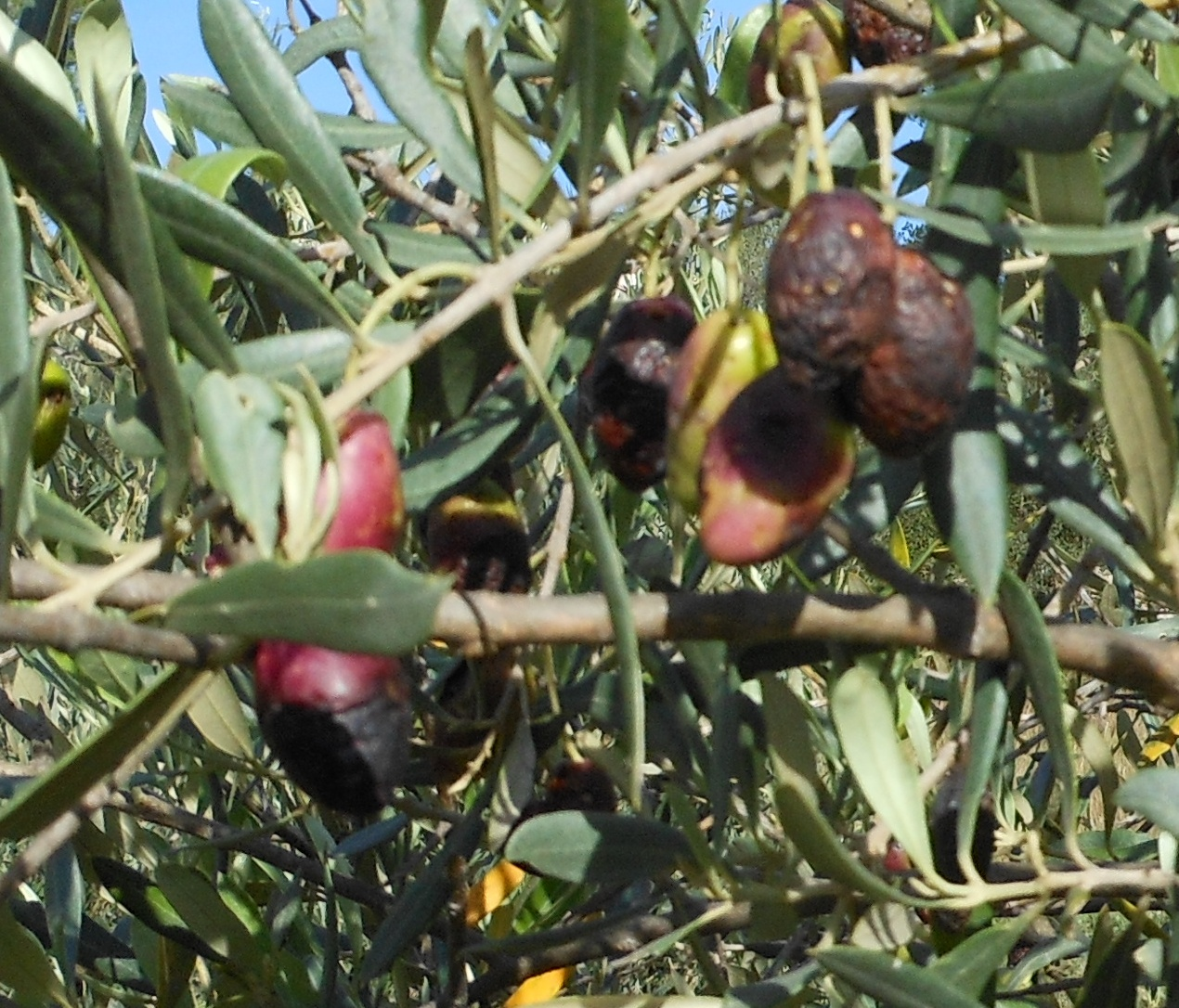 Damaged picholines olive fruits october 2014